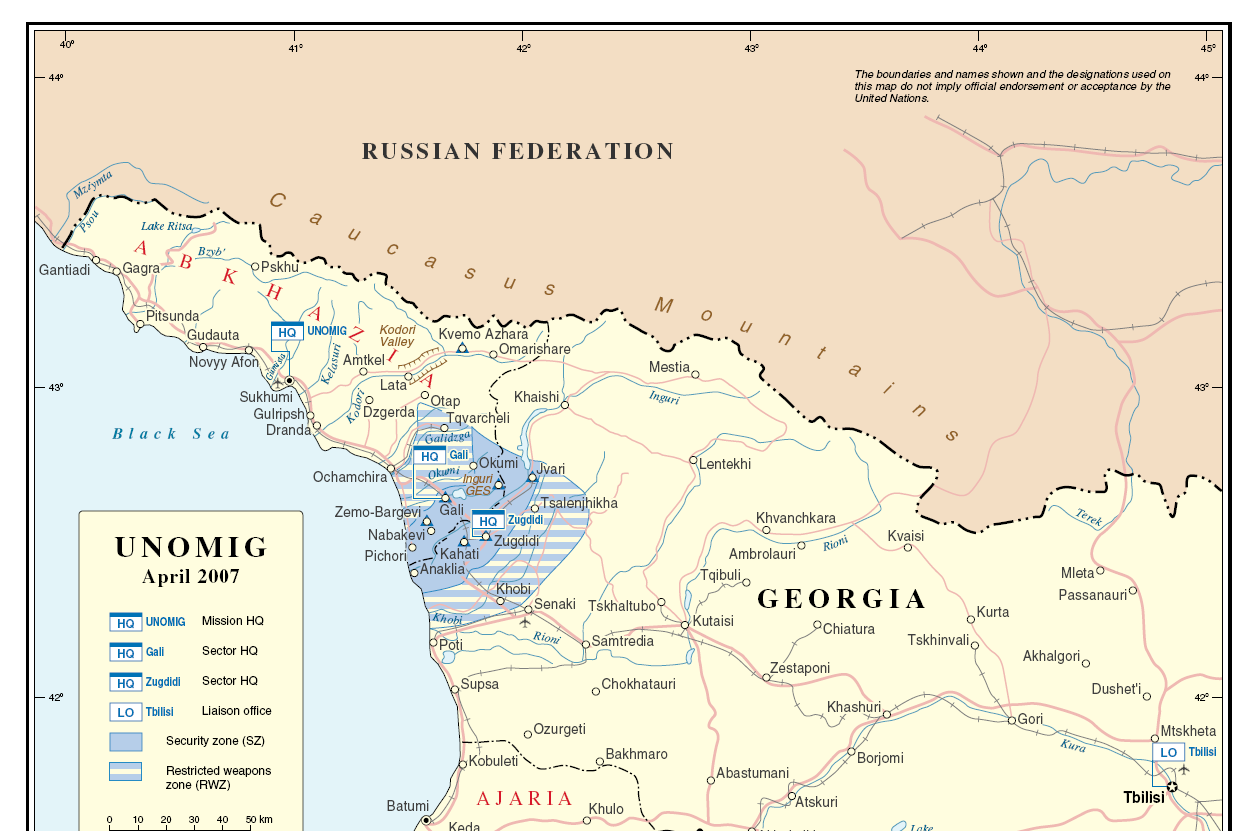 UNOMIG mission map